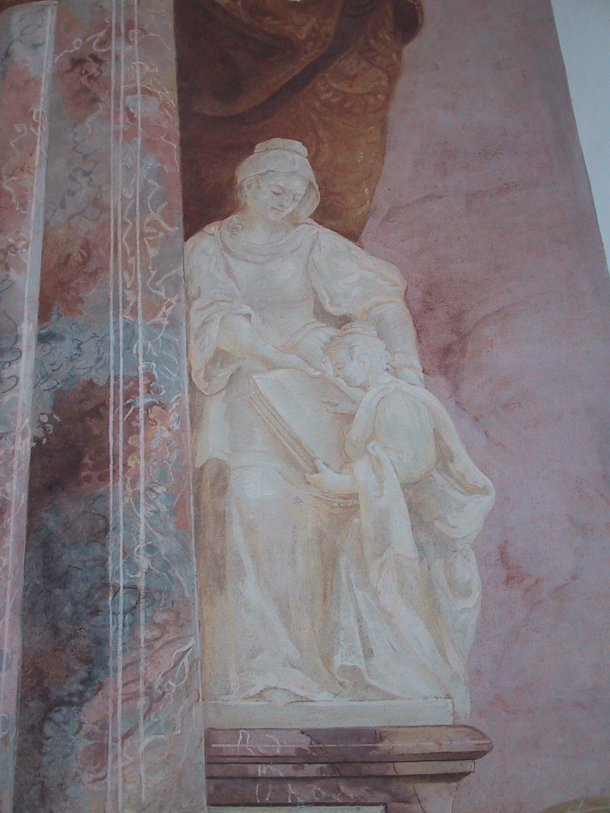 Schlosskapelle Mammern, Figur der heiligen Anna, gemalt von Franz Ludwig Herrmann (1750).